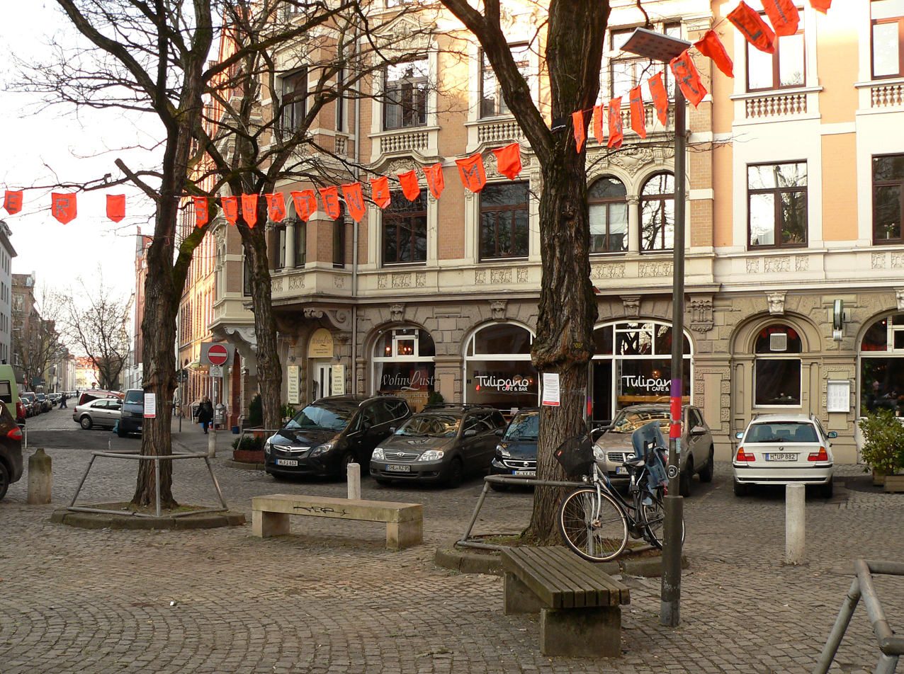 Wedekindplatz in Hannover mit Spruchband gegen Baumfällungen